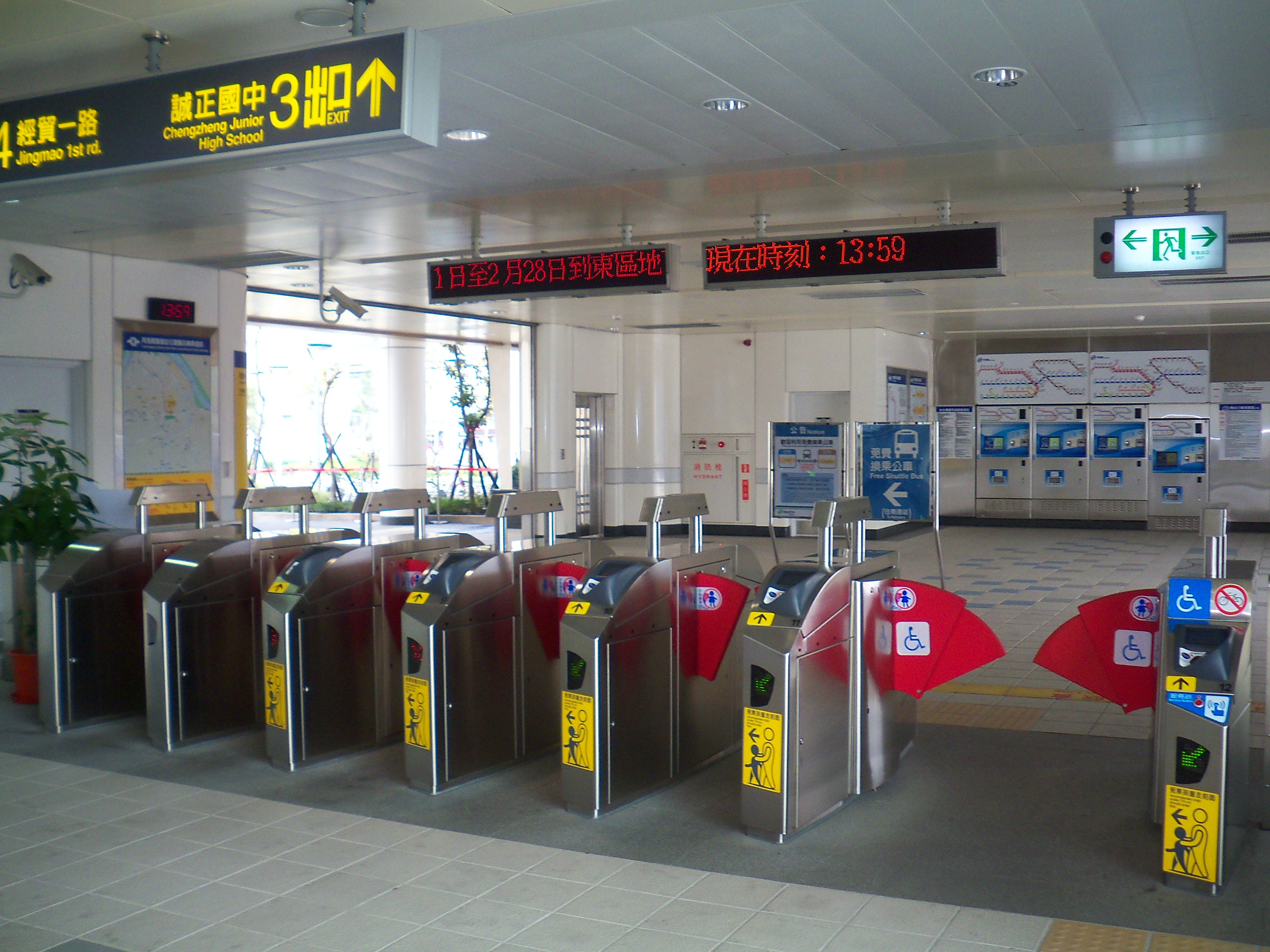 台北捷運内湖線南港展覧館駅地上一階の東改札口。